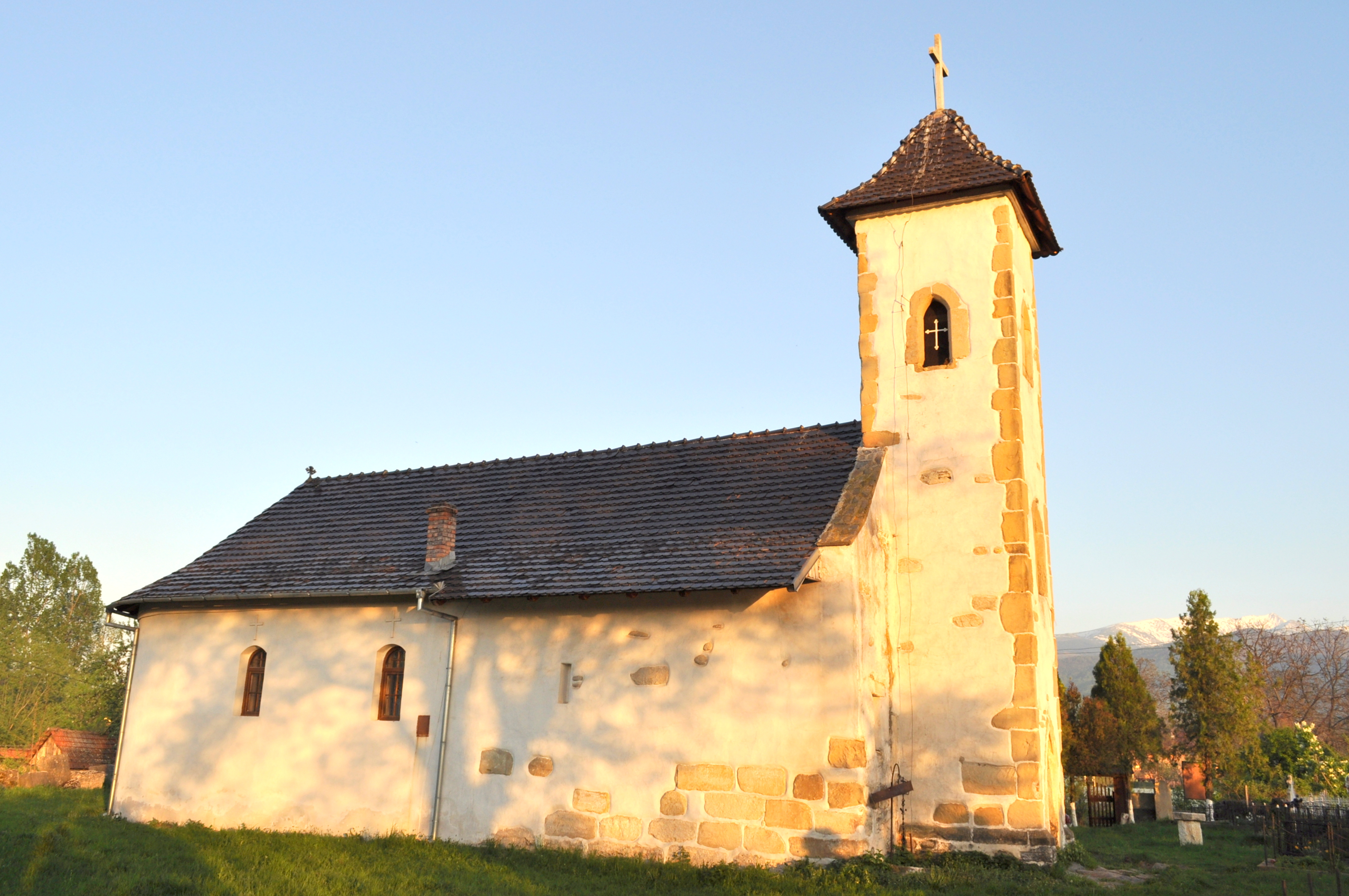 Biserica "Pogorârea Sfântului Duh", sat OSTROV; comuna RÂU DE MORI 01